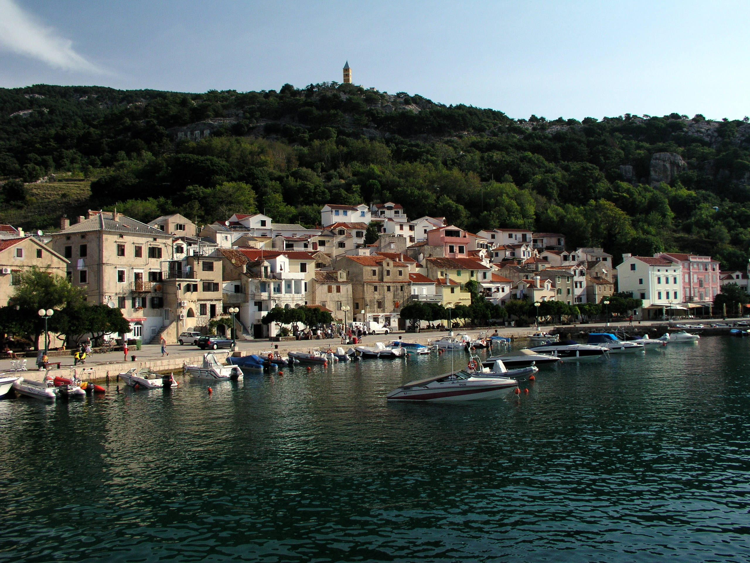 Panorama della località di Baška nell'isola di Veglia, Croazia